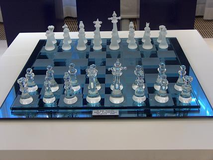 Eigen foto (okt/ 2004)